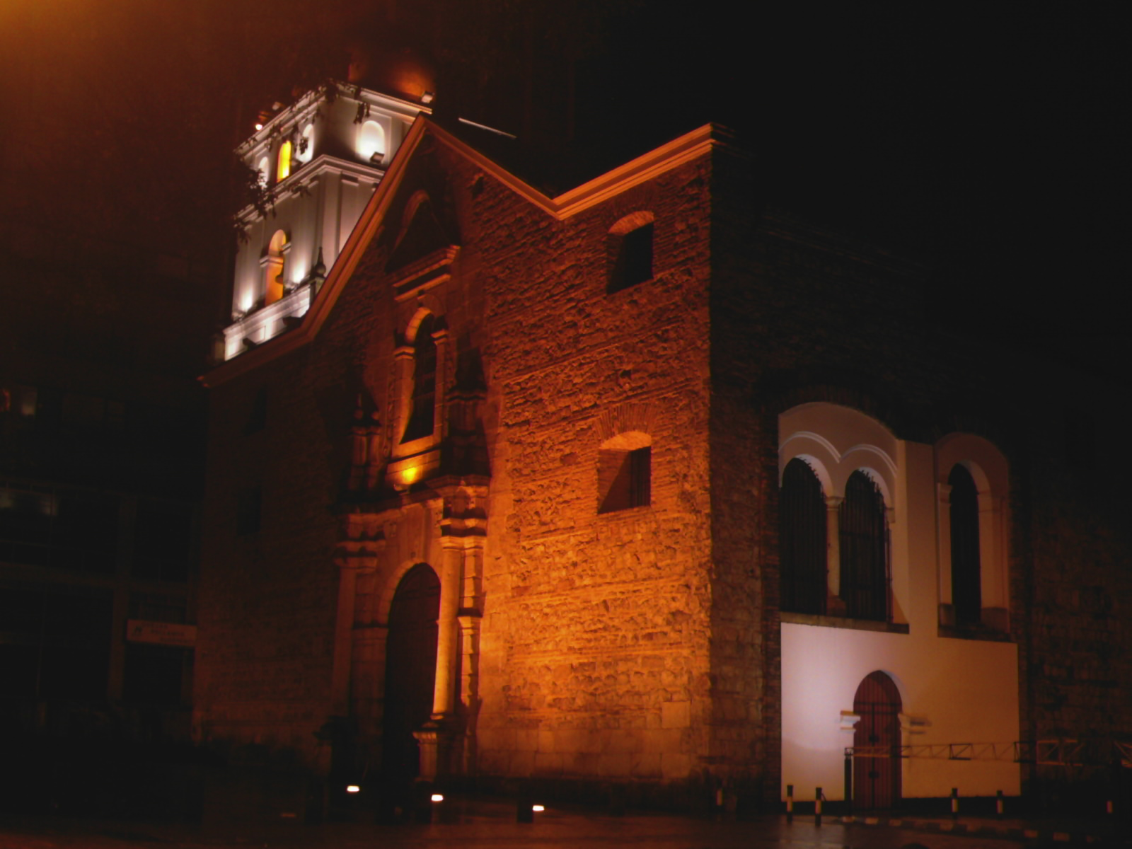 Íglesia de San Agustín, La Candelaria